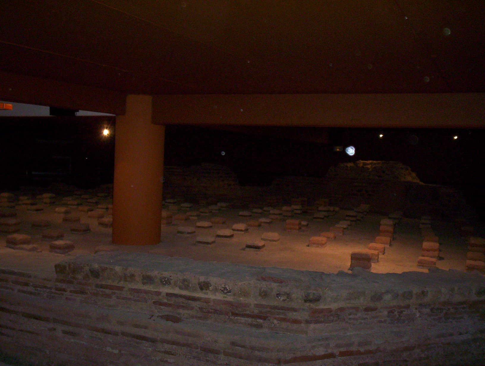 Les restes des thermes de Vindunum, situés dans la ville du Mans.